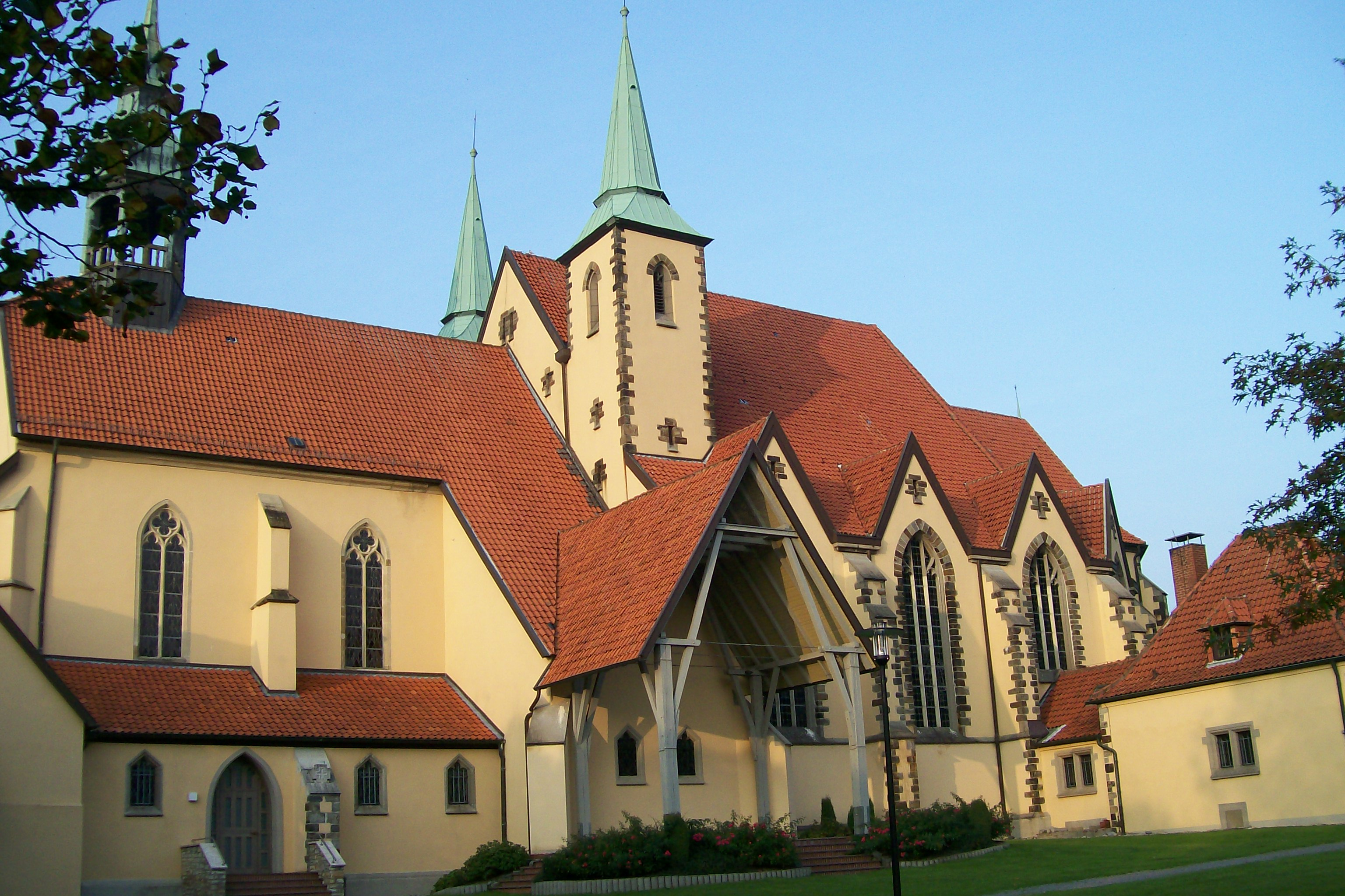 Kirche des ehemaligen Klosters Rulle in Wallenhorst-Rulle in Niedersachsen, erbaut 1927 bis 1930 im Heimatstil von Heinrich Renard (*1868)